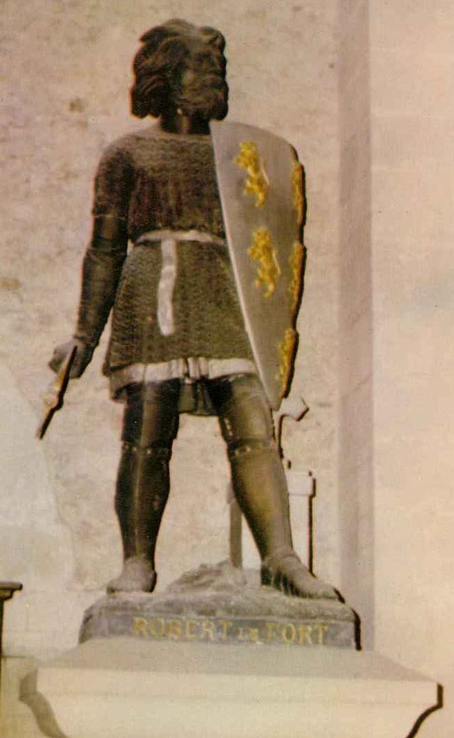 Statue de Robert le Fort par David d'Angers, située dans l'église Notre Dame de Brissarthe.